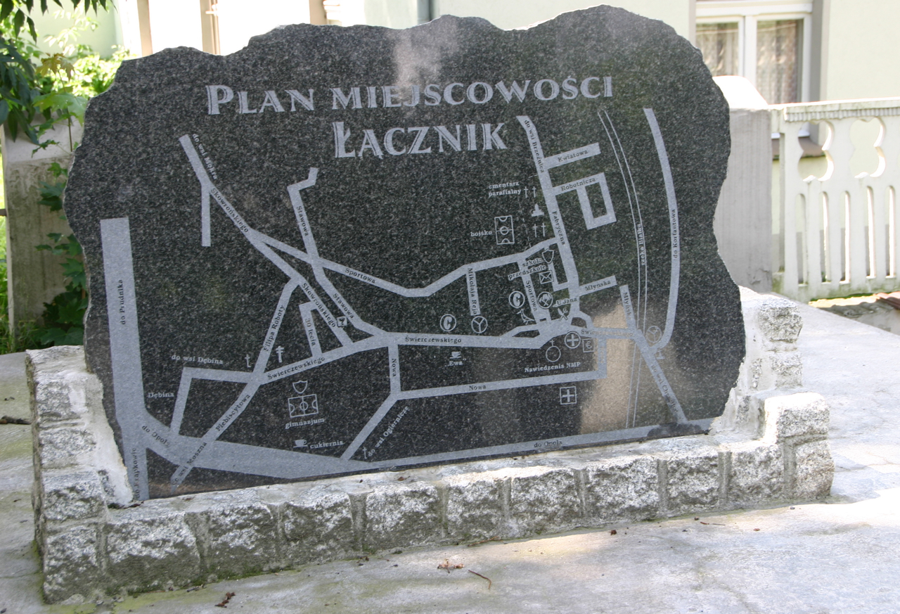 Łącznik (dodatkowa nazwa w j. niem. Lonschnik) – wieś w Polsce położona w województwie opolskim, w powiecie prudnickim, w gminie Biała.